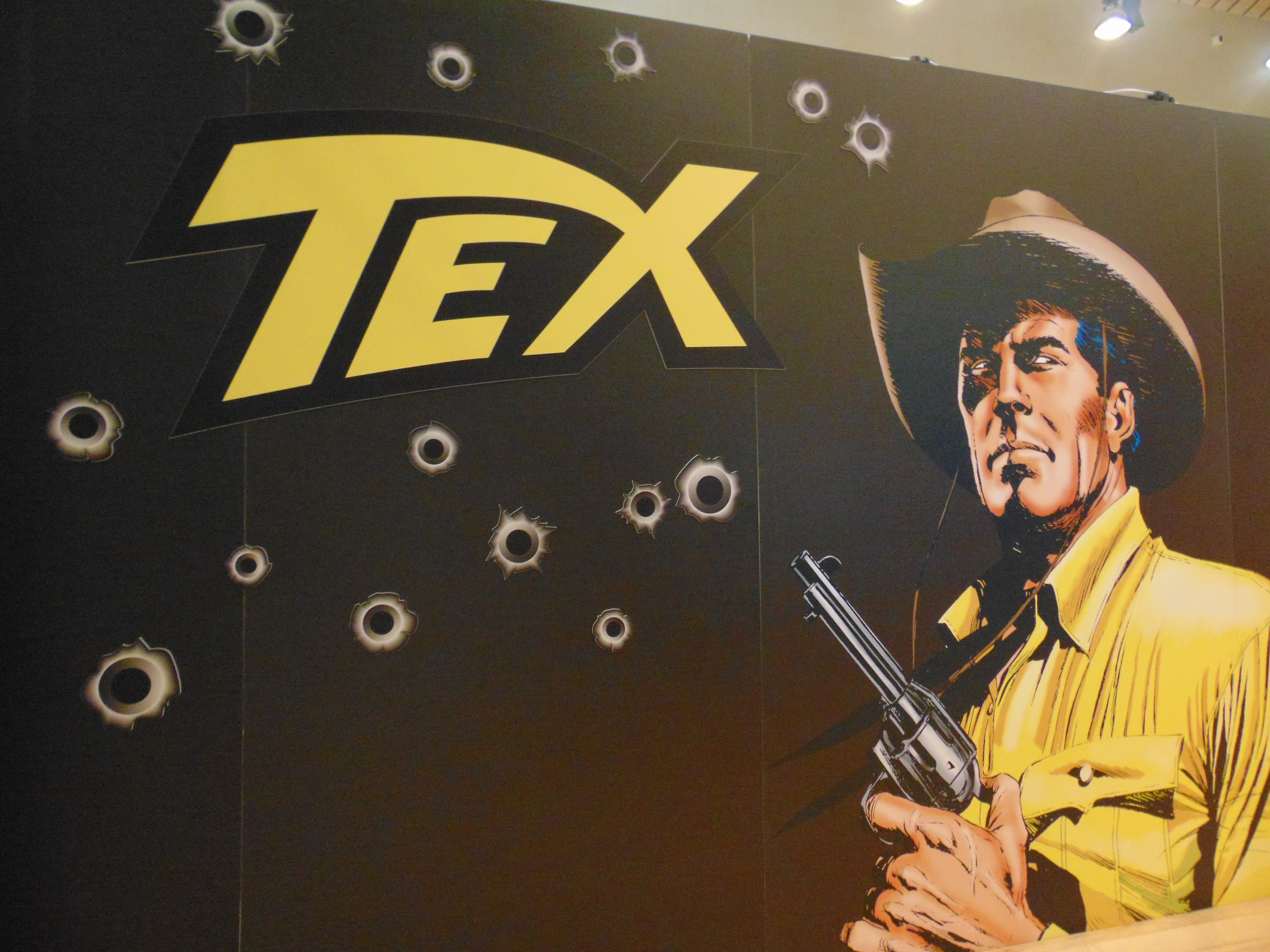 Tex - 70 anni di un mito @ Arf! Festival 2019